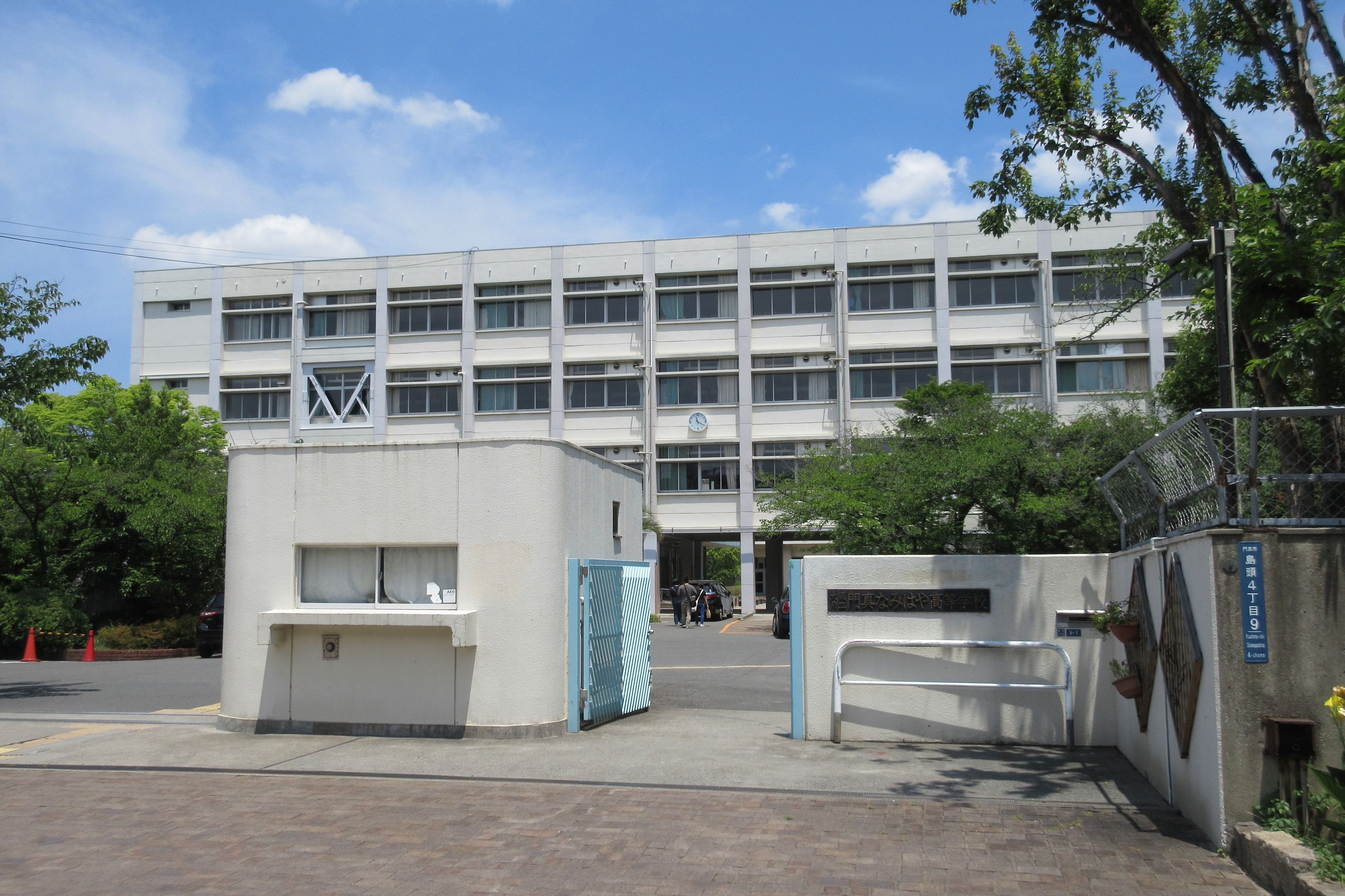 大阪府立門真なみはや高等学校